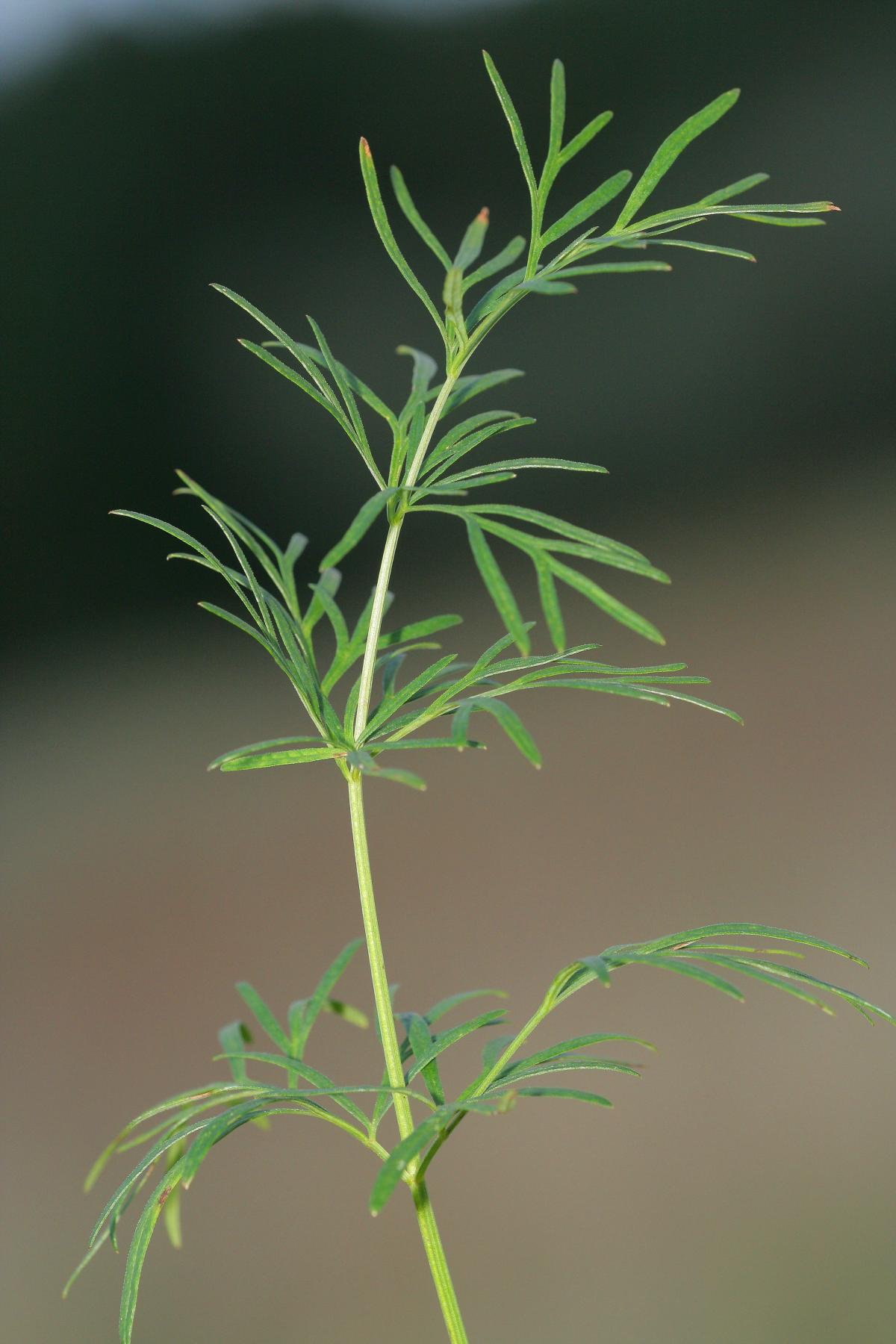 Sumpf-Brenndolde (Cnidium dubium), Blatt